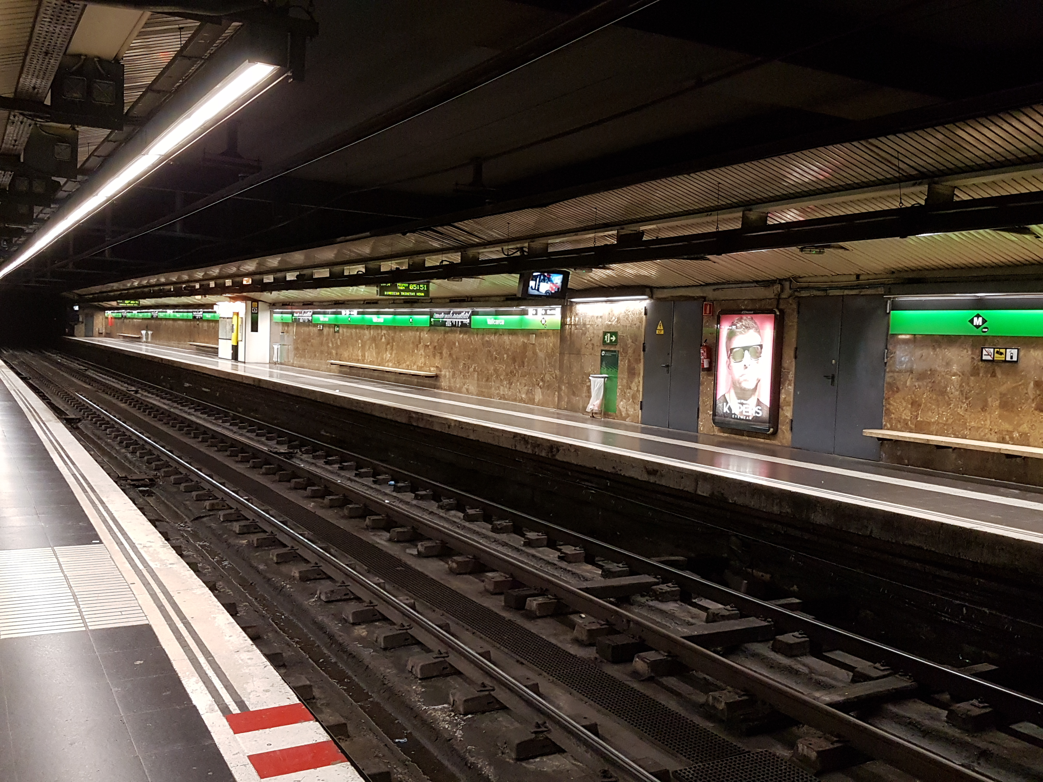 Vies i andanes